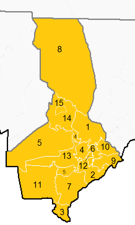 Южно-Казахстанская область. Административное деление.